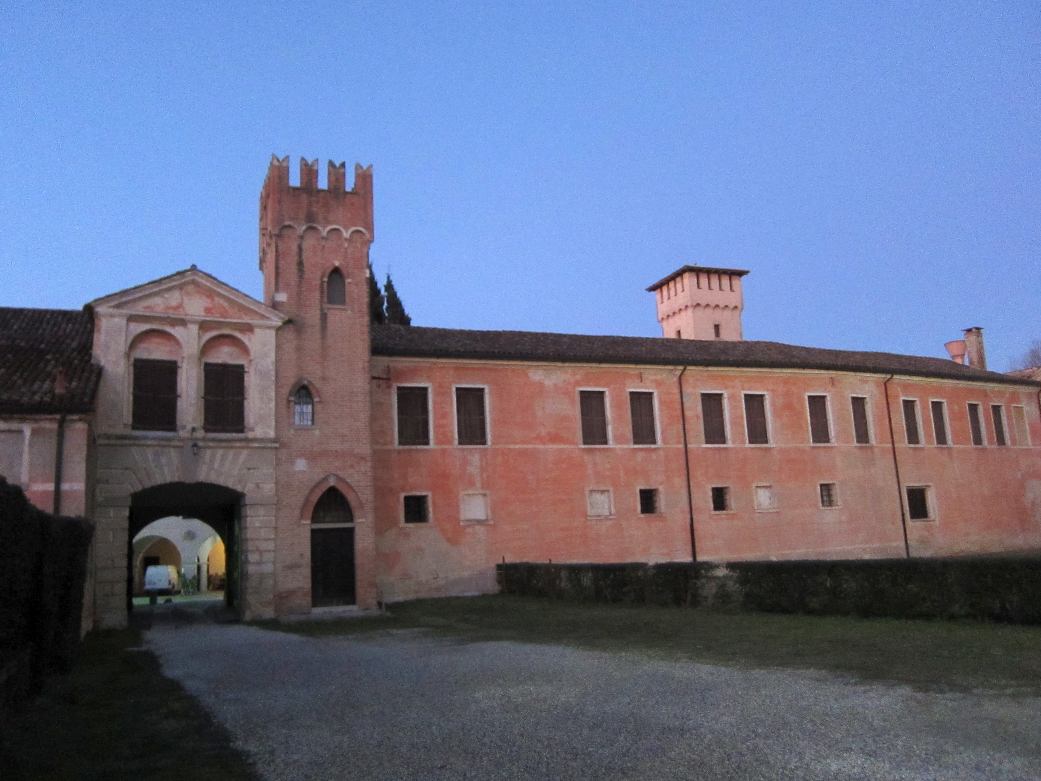 Abbazia Santa Maria del Pero, Monastier di Treviso, TV, Italien